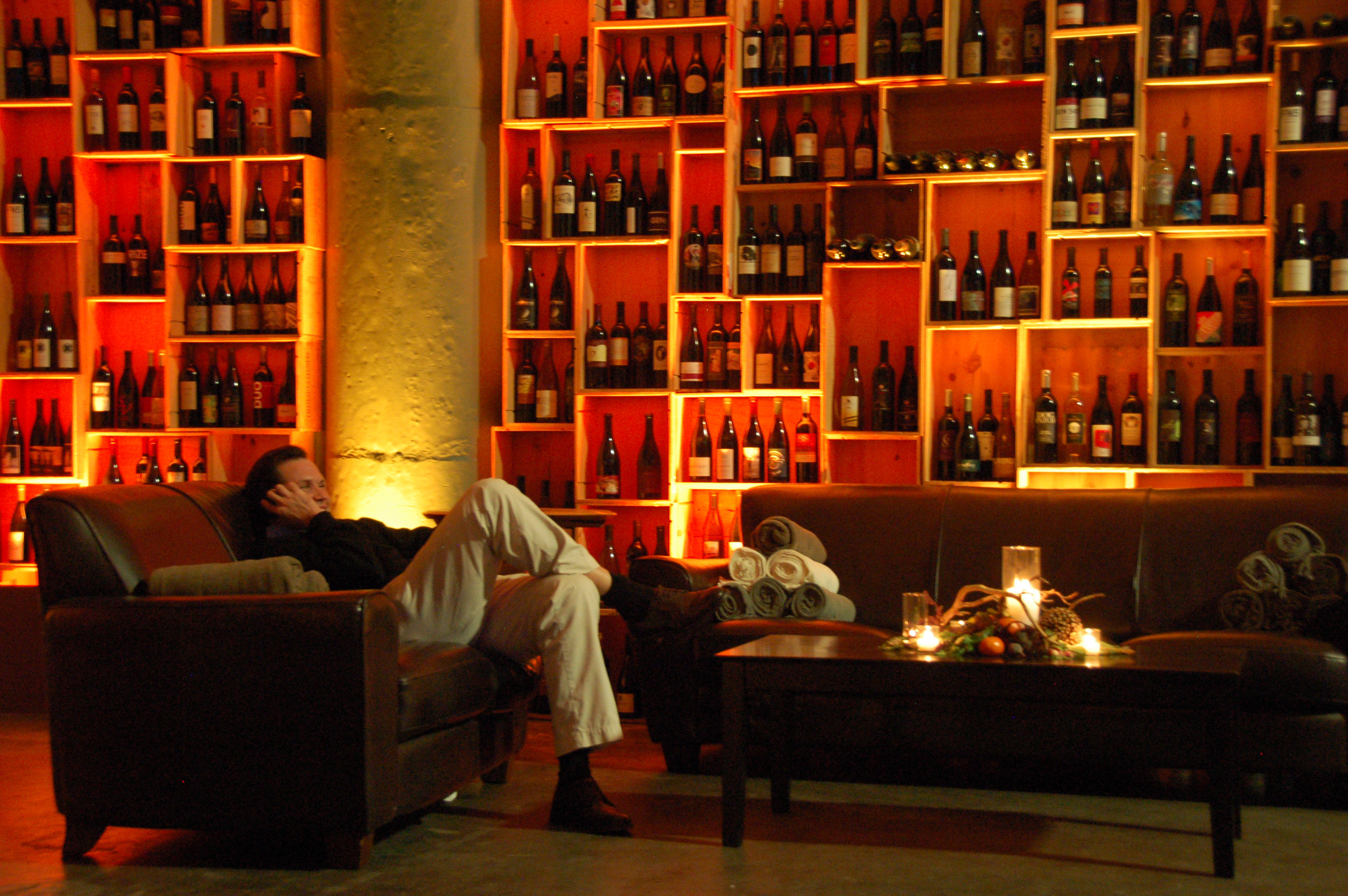 Détente chez Crushpad